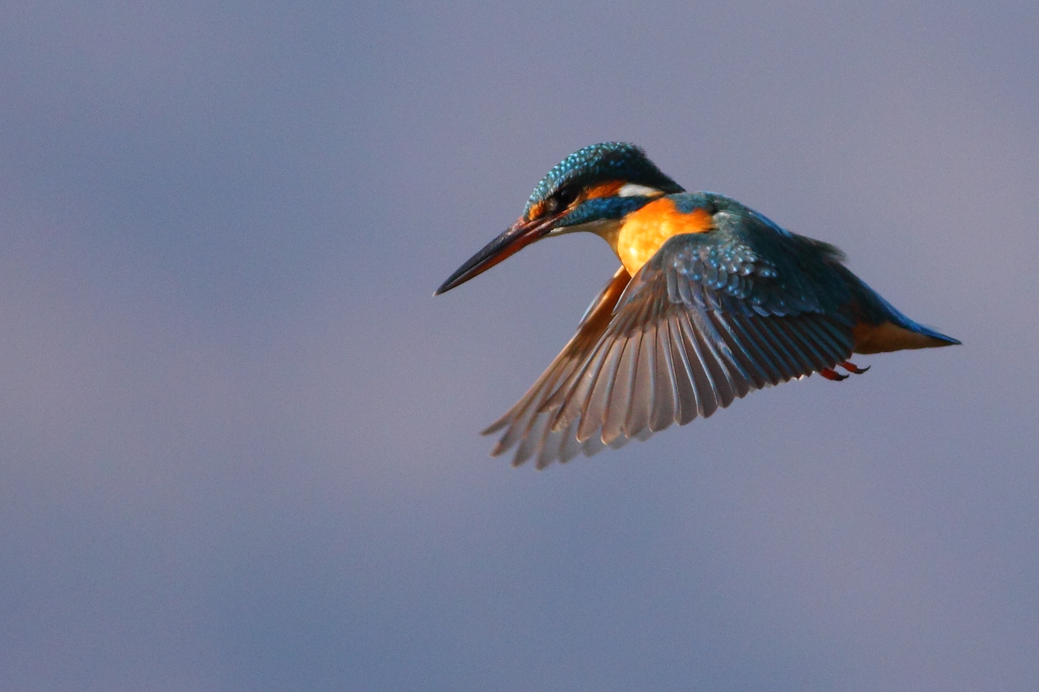 Opera propria. Fotografia scattata il 21 Gennaio 2012. Autore Cristiano Crolle.